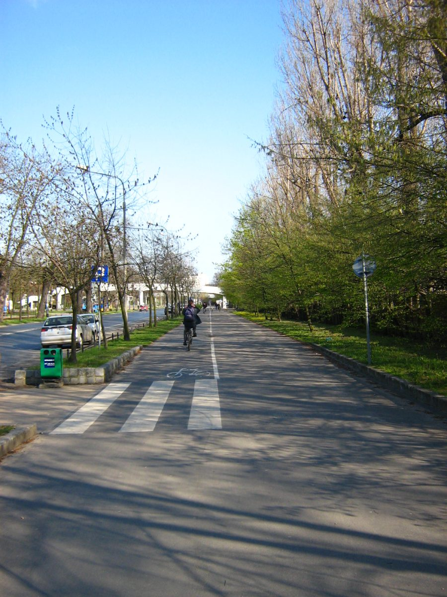 Bicycle path (ścieżka rowerowa), Wróblewskiego, Wrocław, Poland